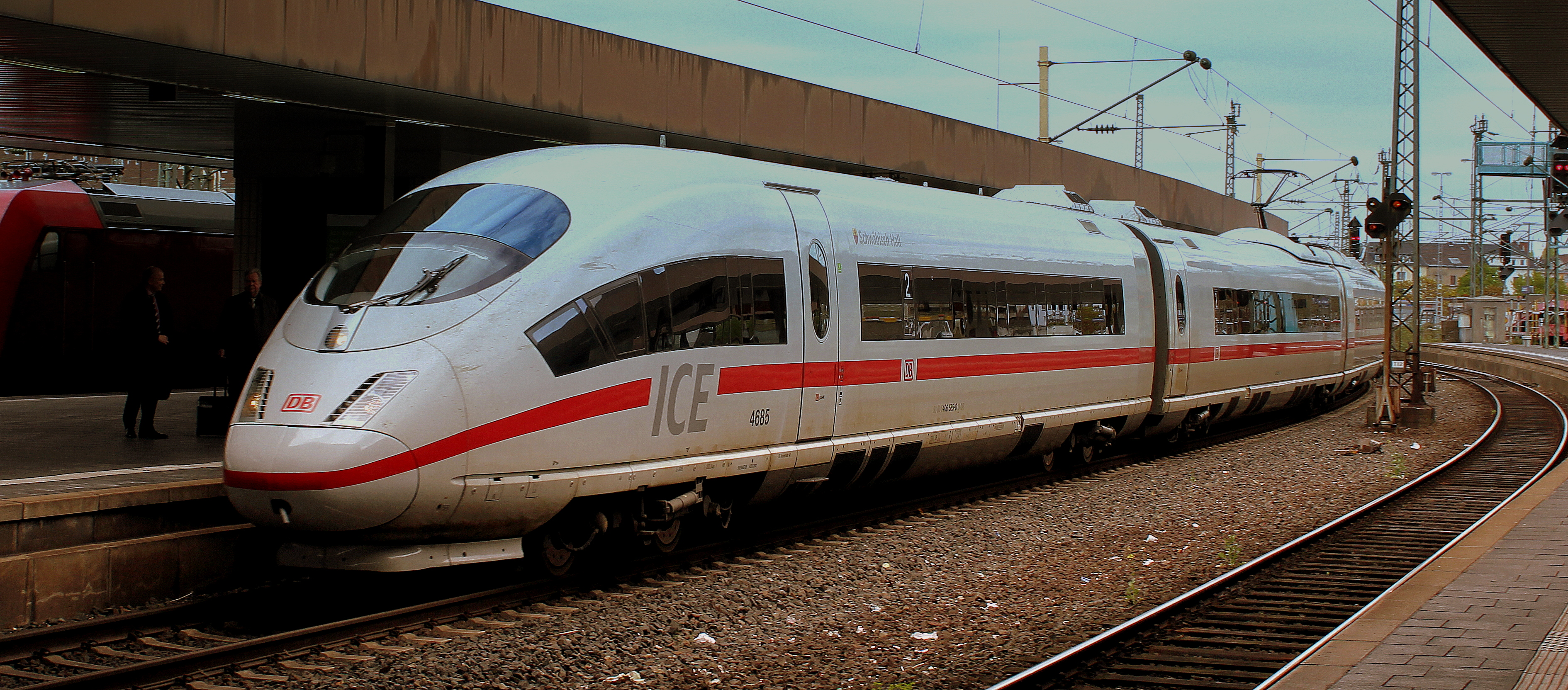 DB SIEMENS ICE TRAIN AT DUSSELDORF HAUPTBAHNHOF GERMANY APRIL 2013